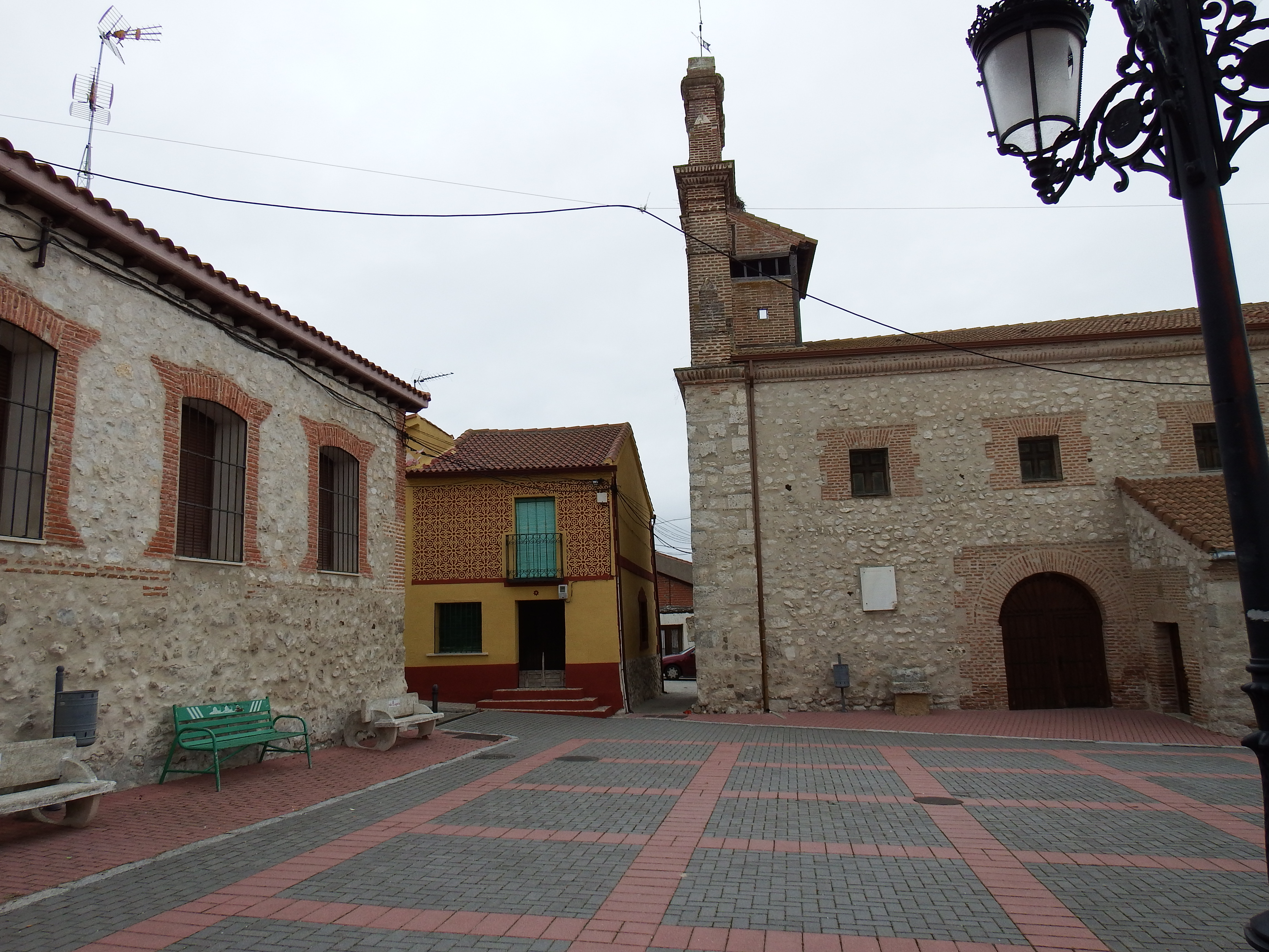 Fuente el Olmo de Íscar